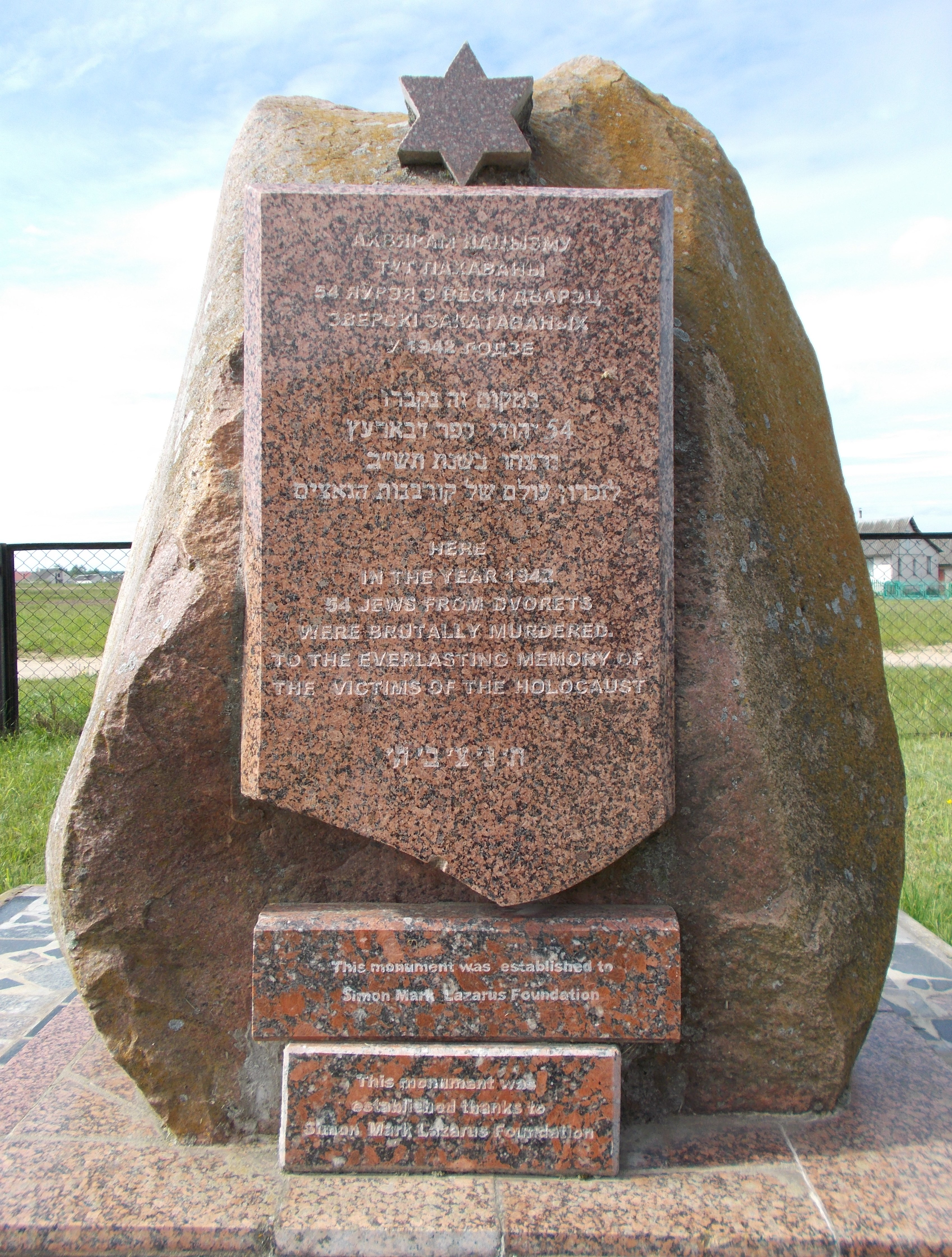 Еврейское кладбище в Дятлово (Гродненская область). Находится между улицами Октябрьская, Гагарина и Булата. На этом кладбище стоят памятники 3000 евреям Дятлово, убитым на этом месте 6 августа 1942 года, 54 евреям из деревни Дворец, убитым нацистами в 1942 году и похороненным здесь, а также место захоронения праха еврея-партизана Ескеля Атласа.